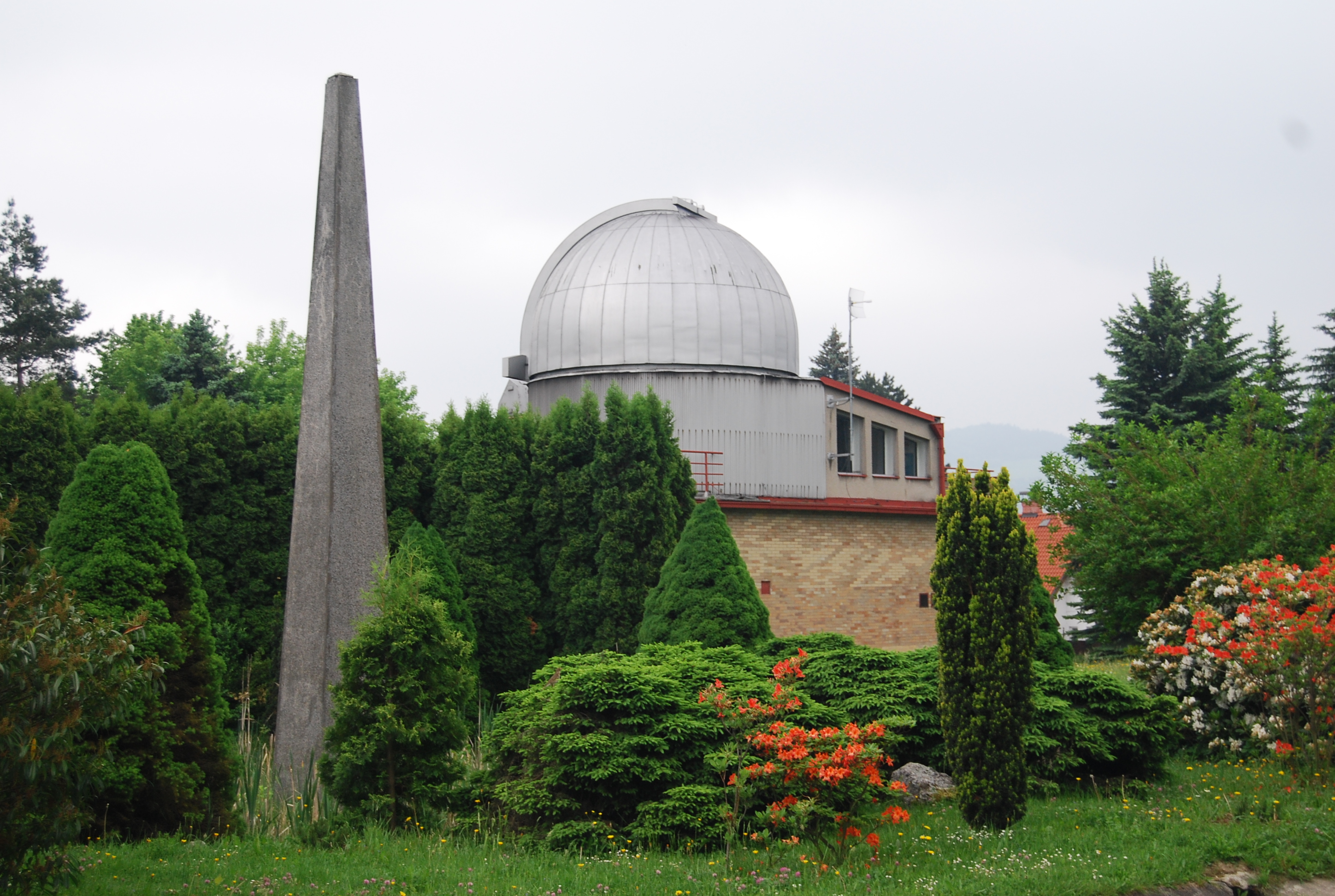 Zahrada Hvězdárny ve Valašském Meziříčí